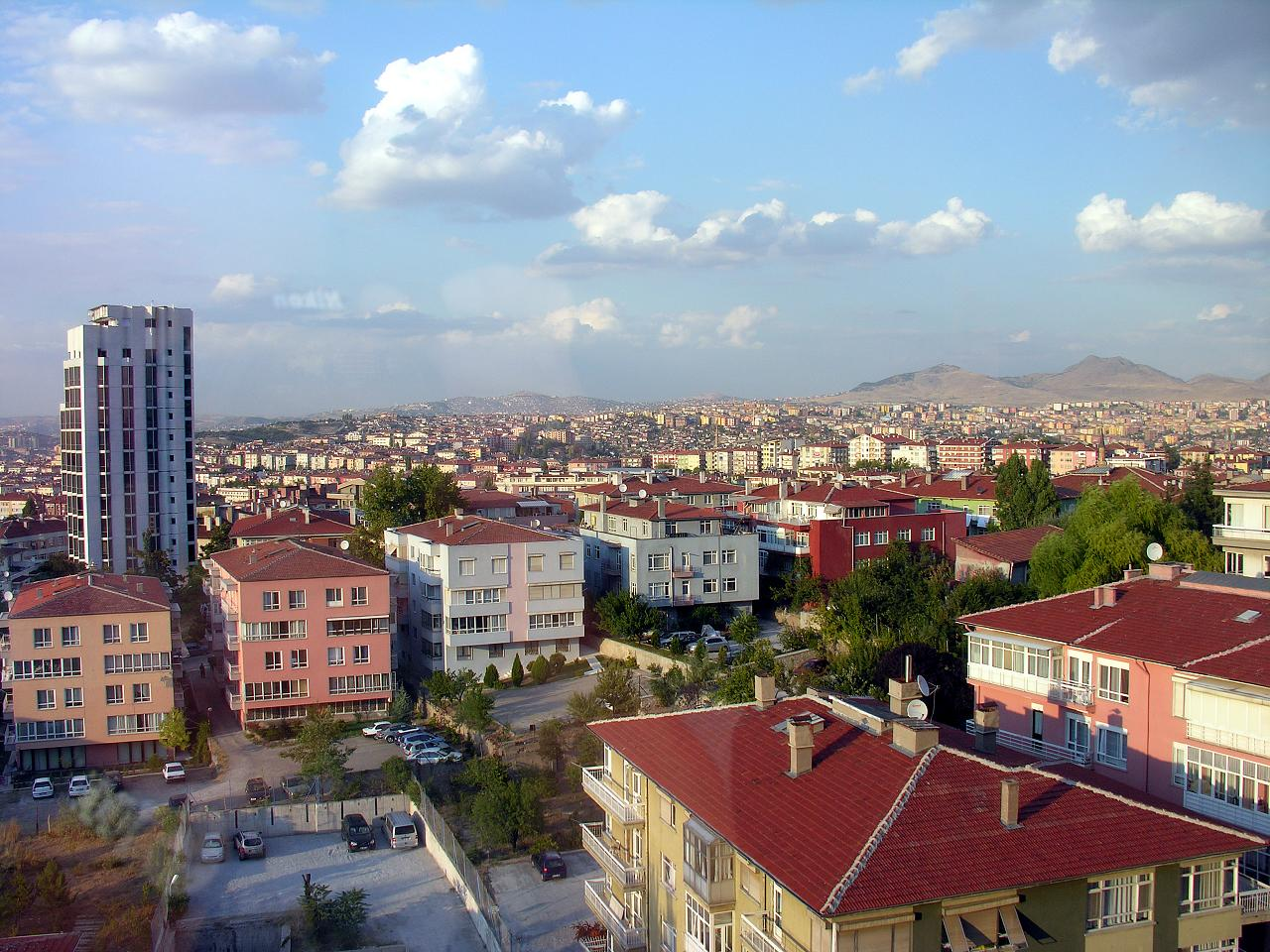 Turkey-1515